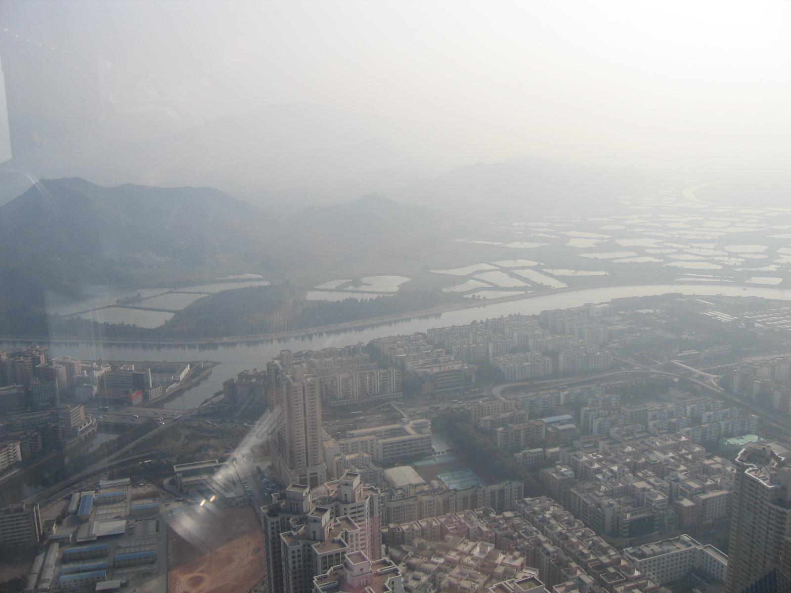 从深圳方向俯瞰深圳河 Overlooking Shenzhen River, Shenzhen, Guangdong, China